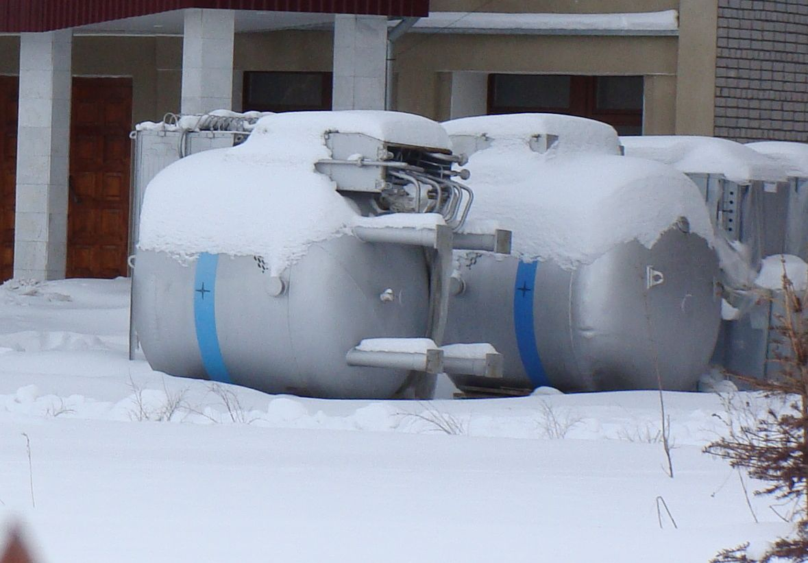 Генератор кислорода лежит под снегом на улице Медсанчасть, Коряжма февраль 2010 .JPG""